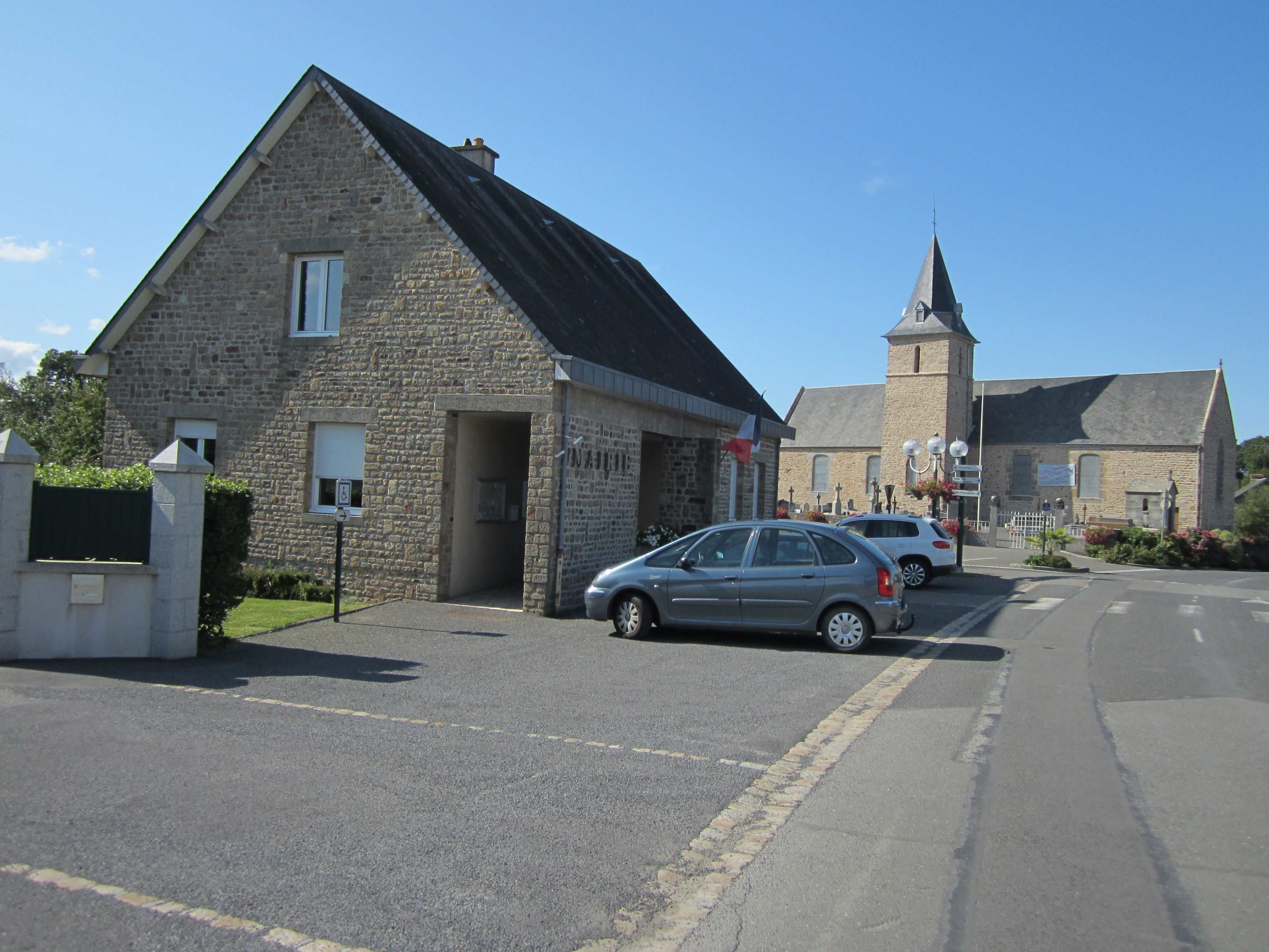 Saint-Senier-sous-Avranches, Manche